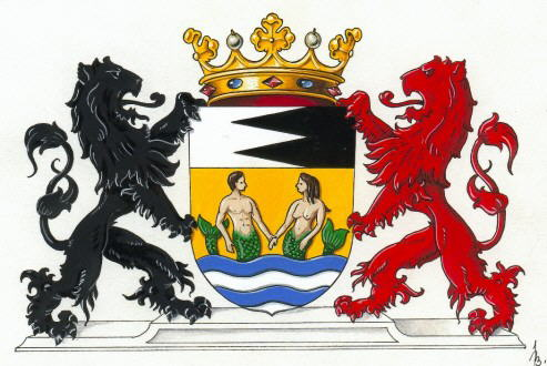 Ardamez Schouwen-Duiveland.